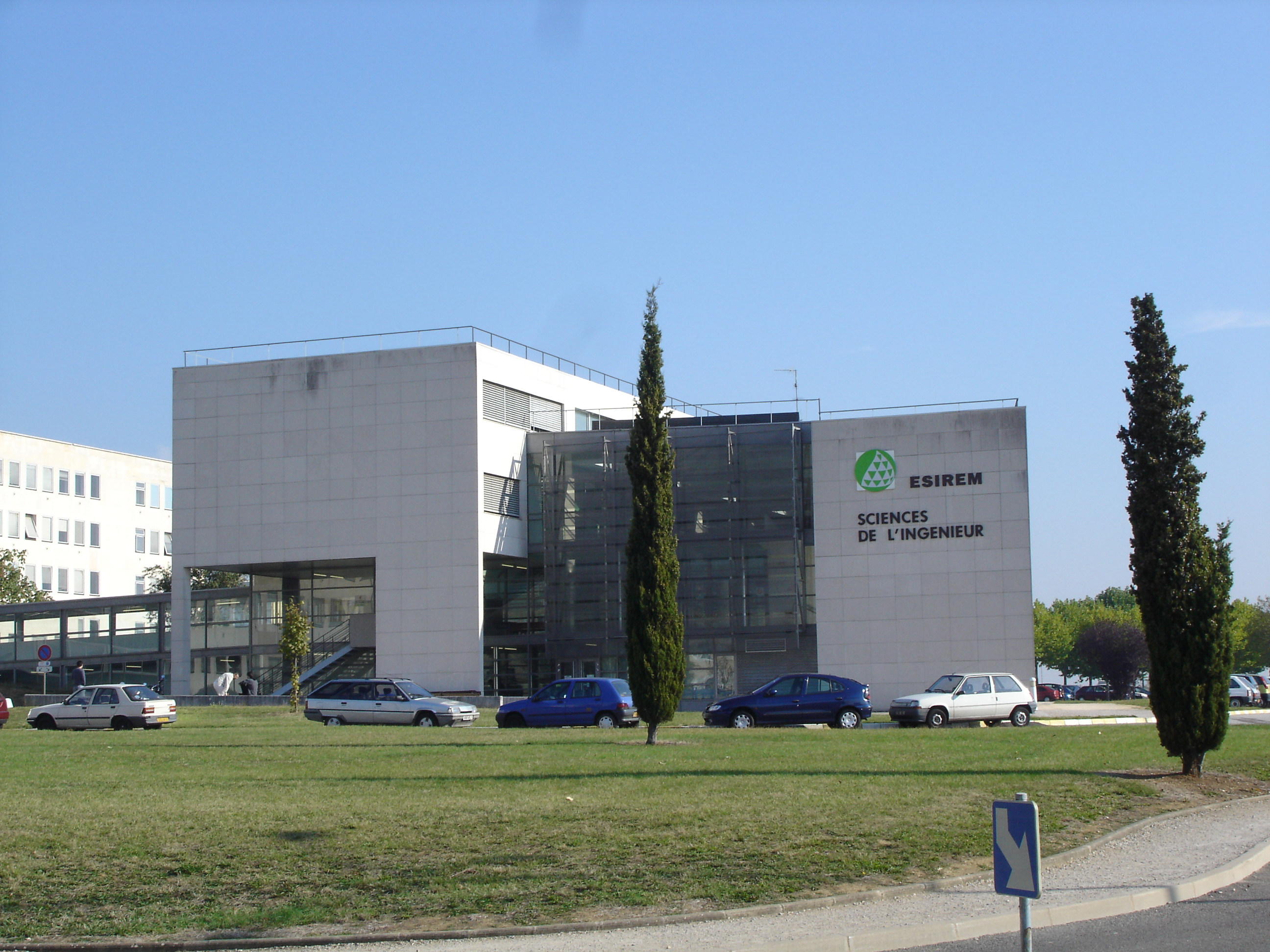 Bâtiment de l'ESIREM (École Supérieure d'Ingénieurs en REcherche des Matériaux) à Dijon sur le campus de l'Université de Bourgogne.